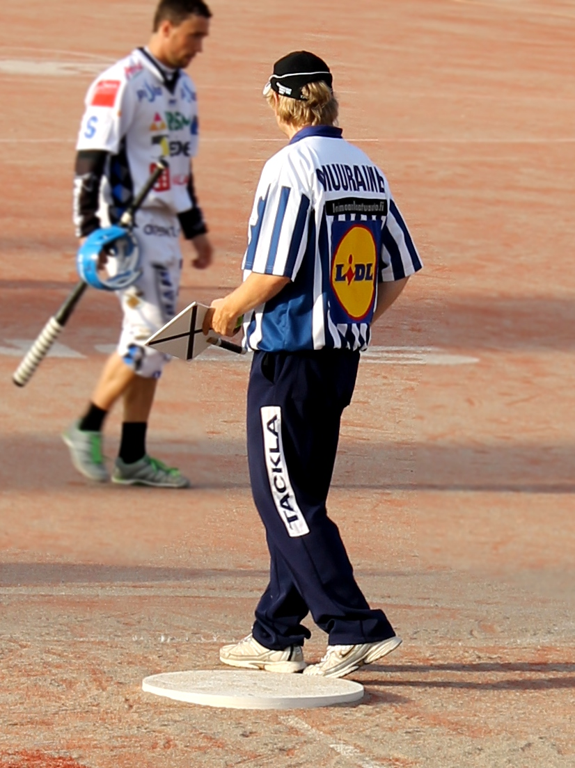 Pesäpallon syöttötuomari Ossi Muurainen Superpesiksen ottelussa Jymy-Maila-Jussit kaudella 2012.